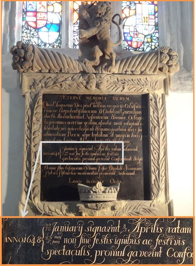 Gedenksteen tachtigjarige oorlog, Jacobijnenkerk Leeuwarden